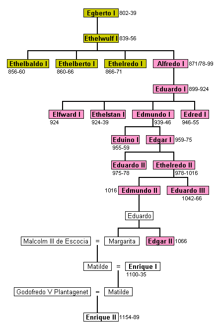 Árbol genealógico de los reyes de Wessex y de Inglaterra de la casa de Cerdic o de Wessex